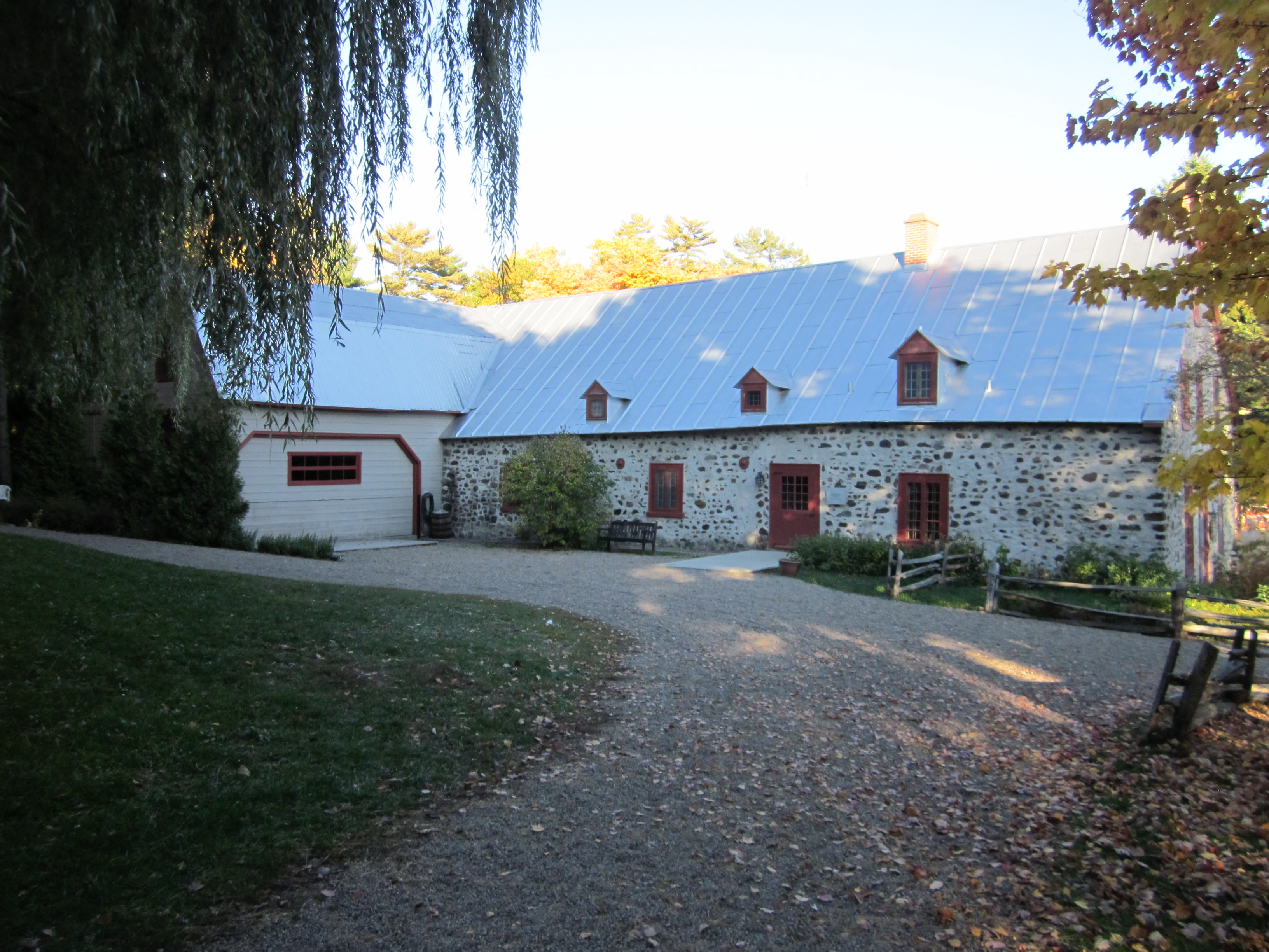 Moulin seigneurial de Tonnancour, 11930, rue Notre-Dame Ouest, Trois-Rivières (Canada). (Protection IP classé. Voir la liste des lieux patrimoniaux de la Mauricie pour plus de détails).